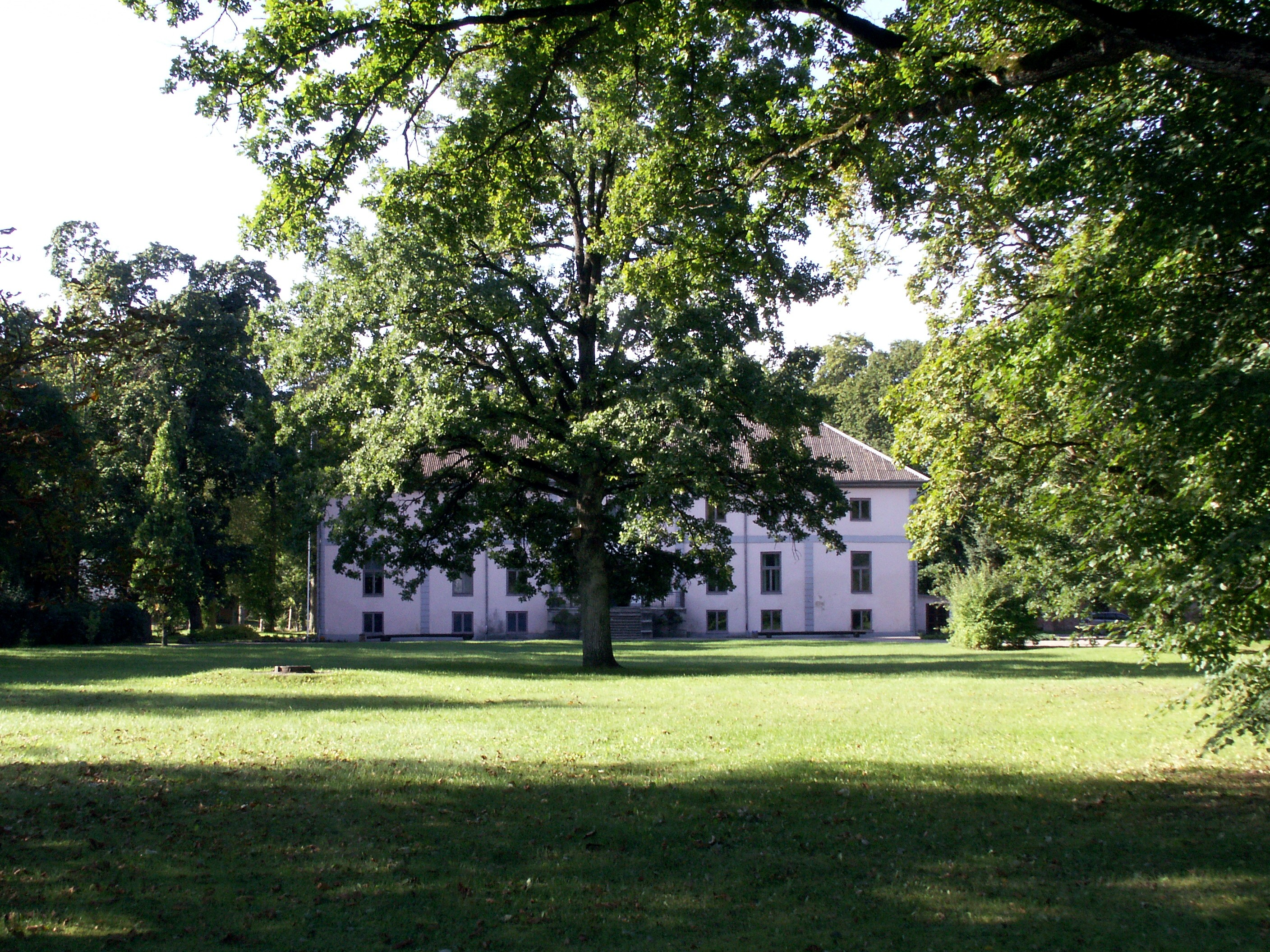 Vilcė, Latvija